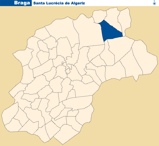 Localização de Santa Lucrécia de Algeriz no concelho de Braga.